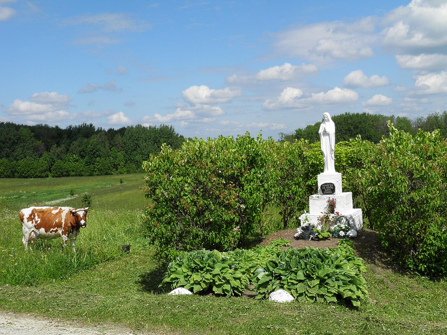 Marija ir karve